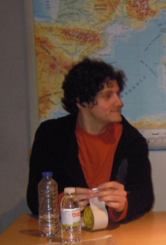 Eduard del Castillo Velasco nunha charla sobre a lingua catalá no Centro Social A Revira (Pontevedra)